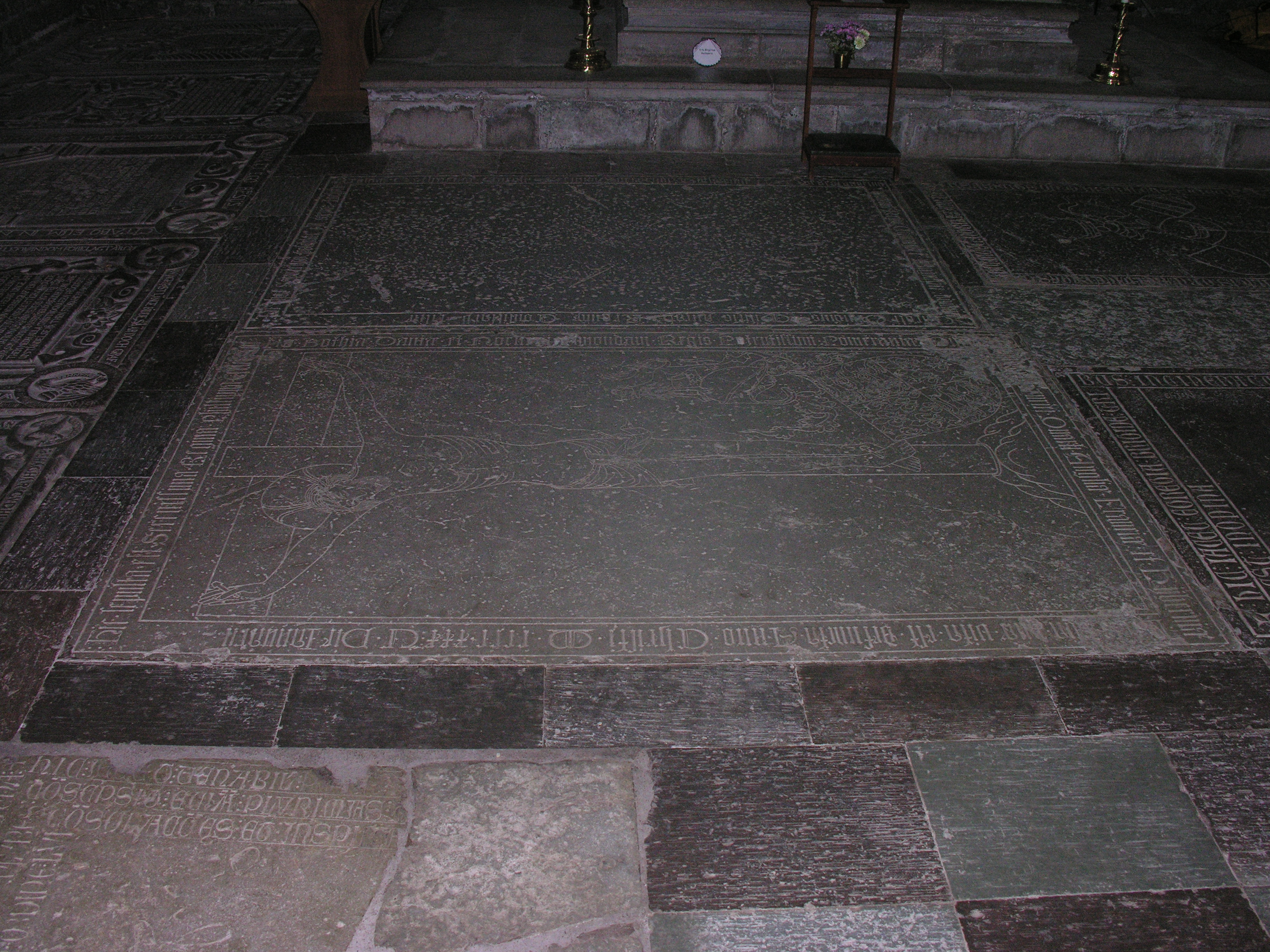 Vadstena. Nagrobek Filipy Lancaster & Katarina Gumsehuvud